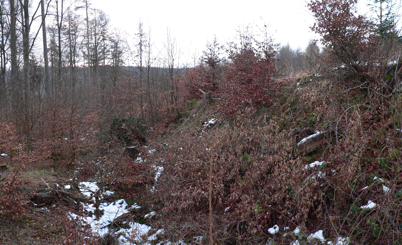 Außenseite des Walls des Kring